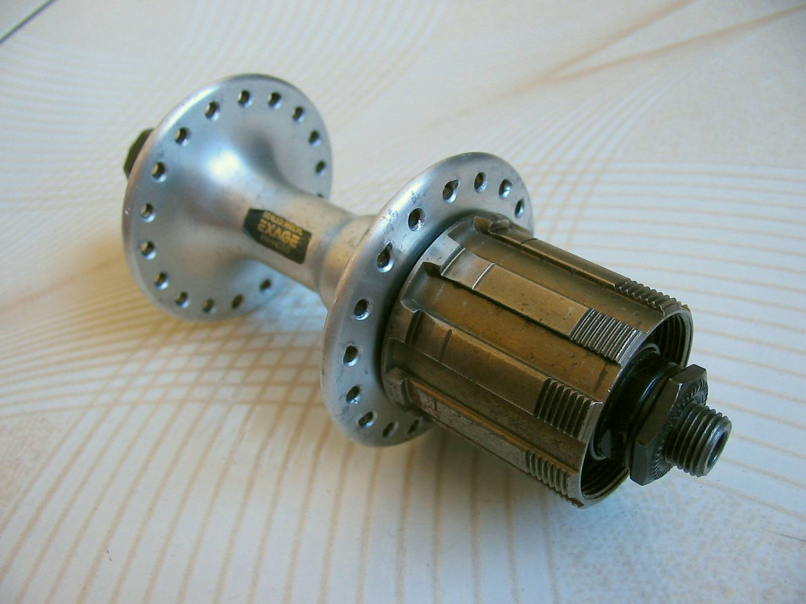 Shimano Exage freehub